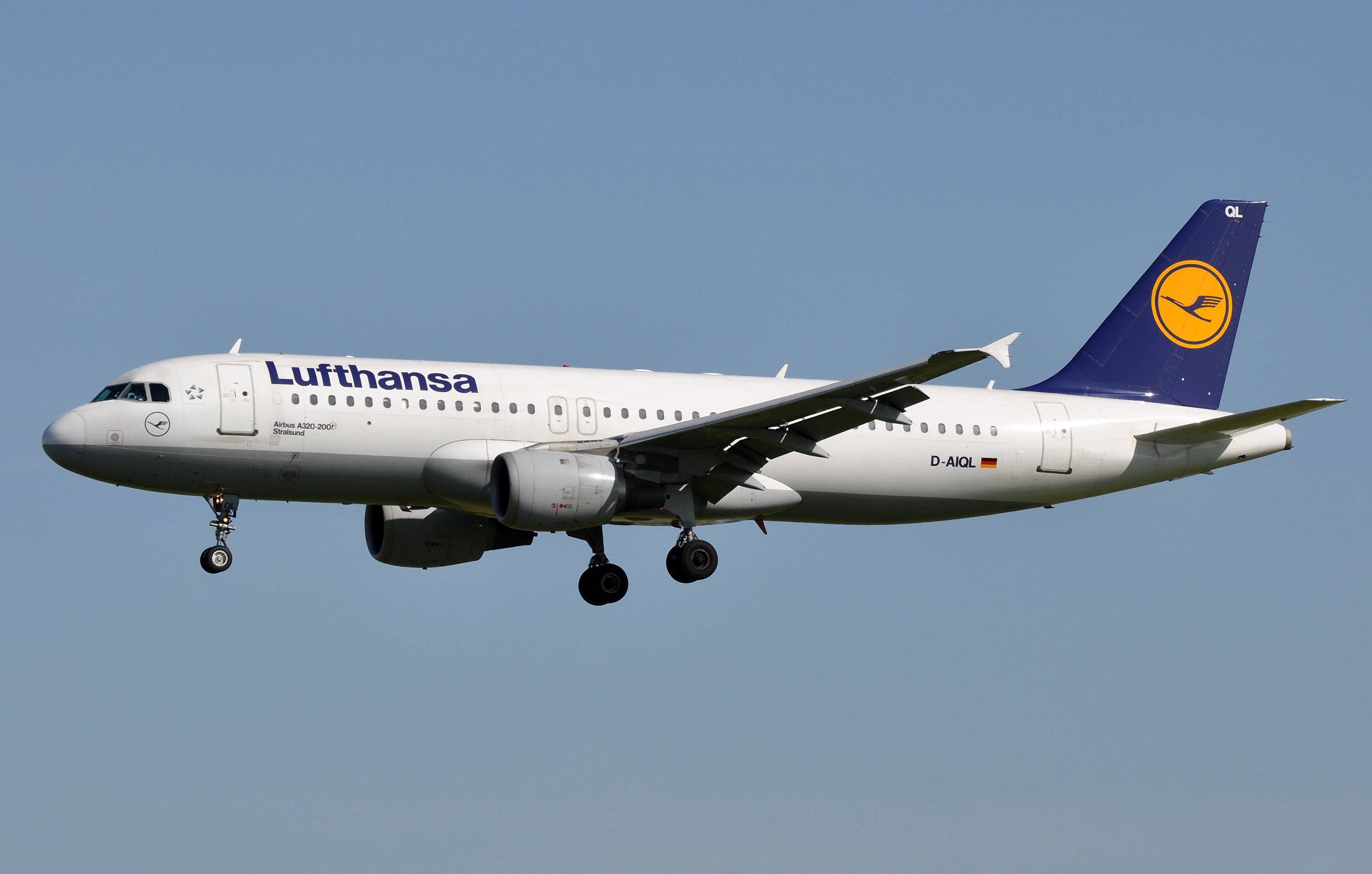 MSN 267 A320-211 LUFTHANSA DUB